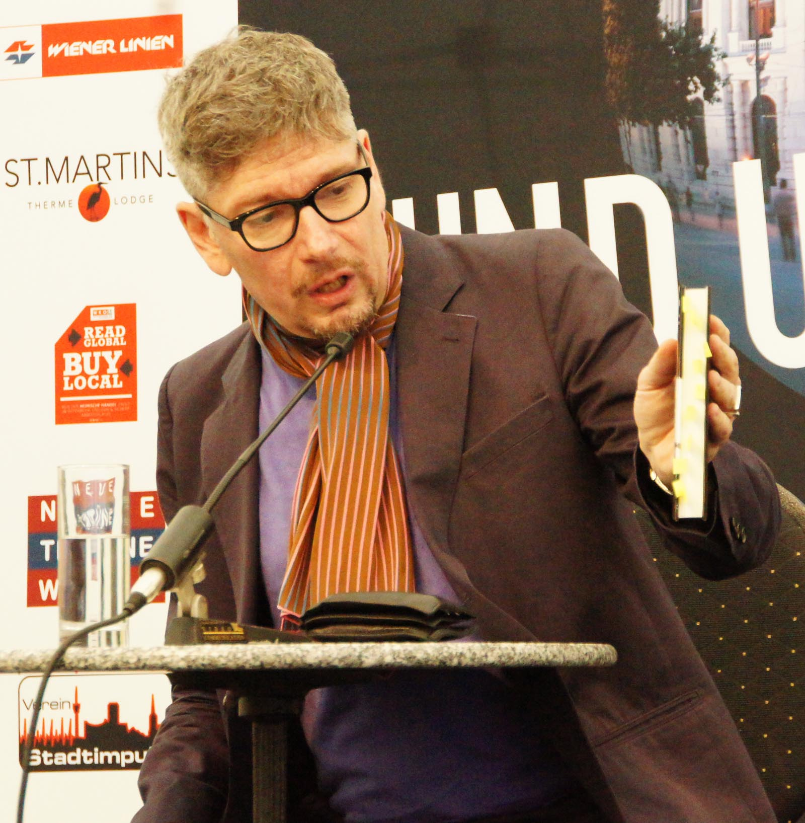 Vienna - 'Rund um die Burg' - Klaus Nüchtern, 'Früher waren die Friseure frecher' small